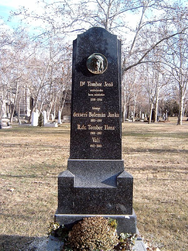 Tombor Jenő (Nyitra, 1880. márc. 3. – Bp., 1946. júl. 25.): vezérezredes, honvédelmi miniszter sírja Budapesten. Kerepesi temető: 19-1-25.